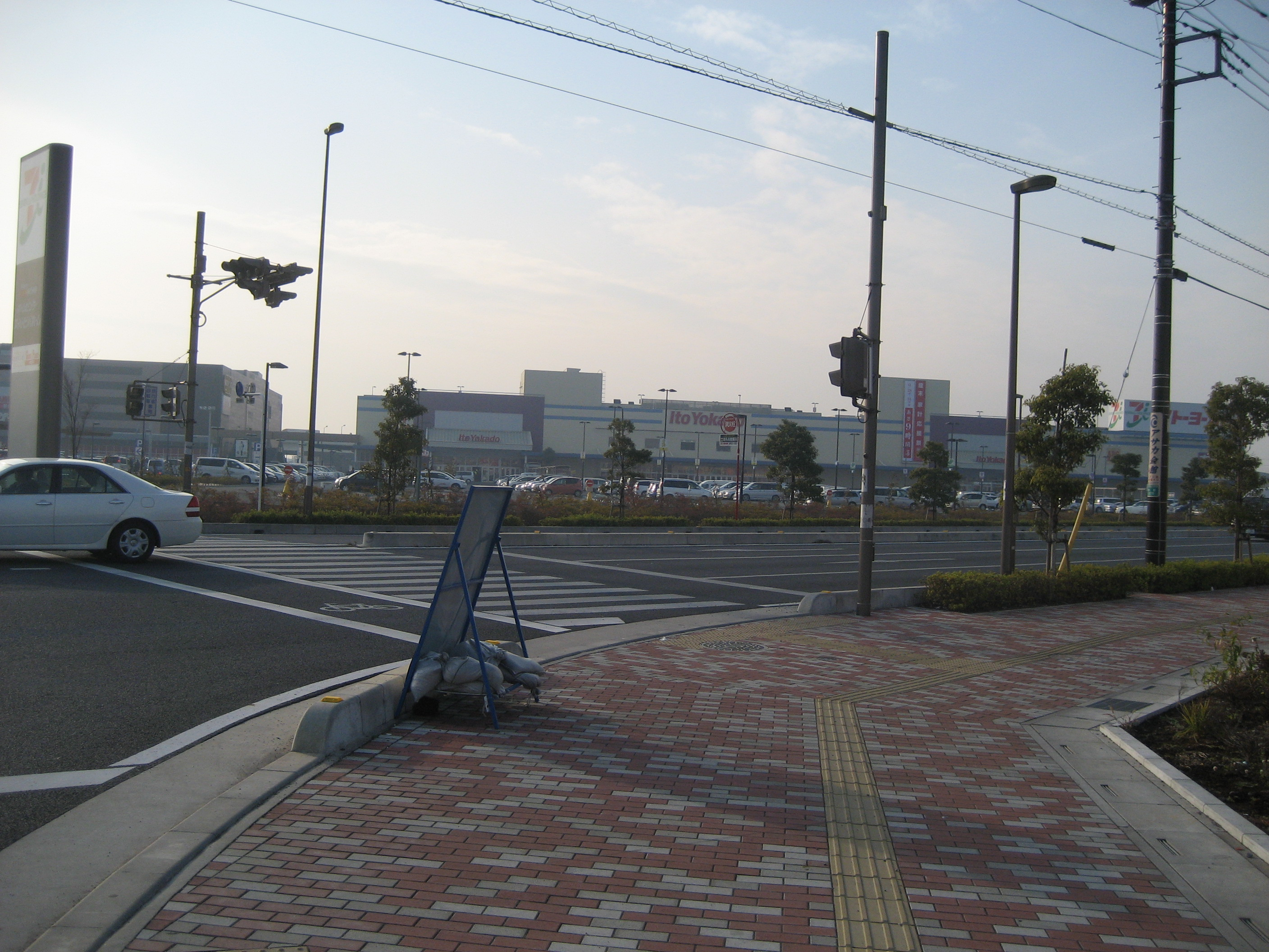 三郷市ピアラシティ